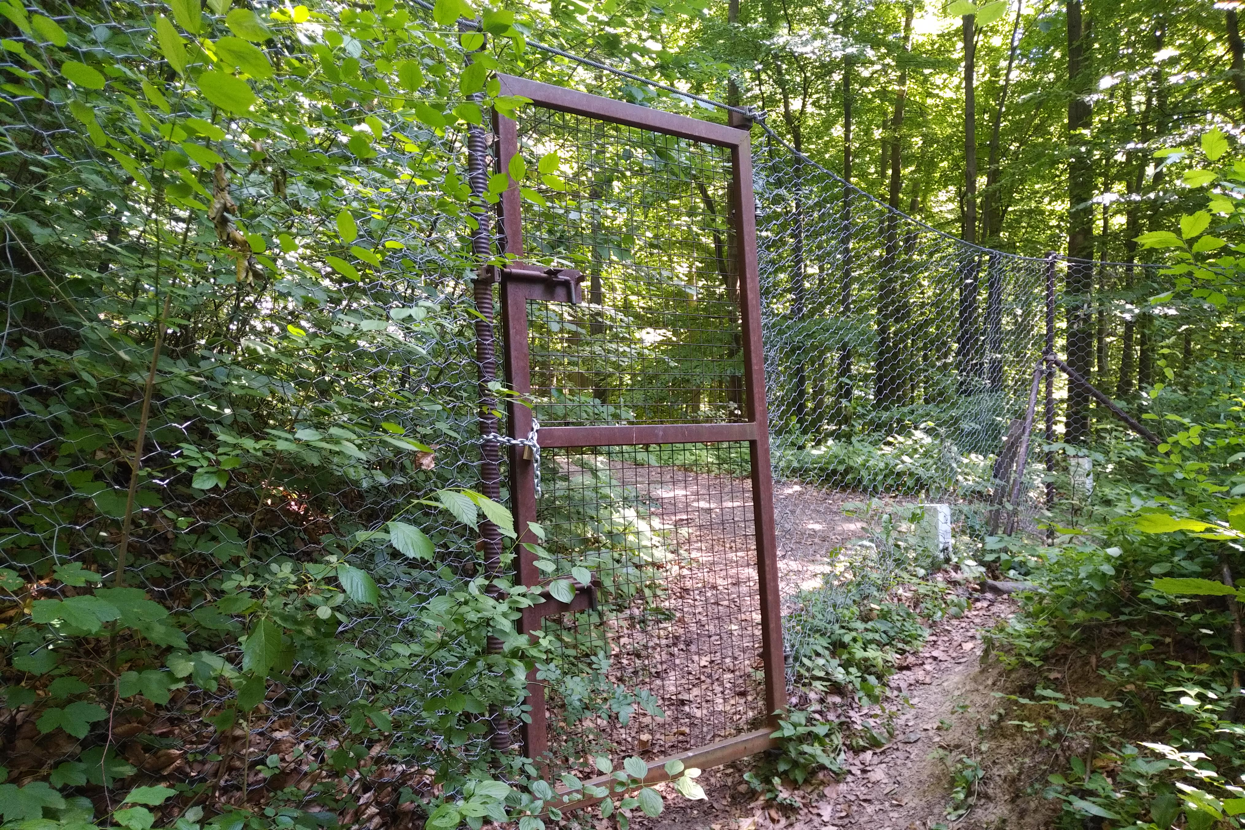 Während der Corona-Krisie wurde der Grenzzaun am Platschberg versperrt. Ursprünglich wurde der Zaun 2015 während der Flüchtlingskrise errichtet.